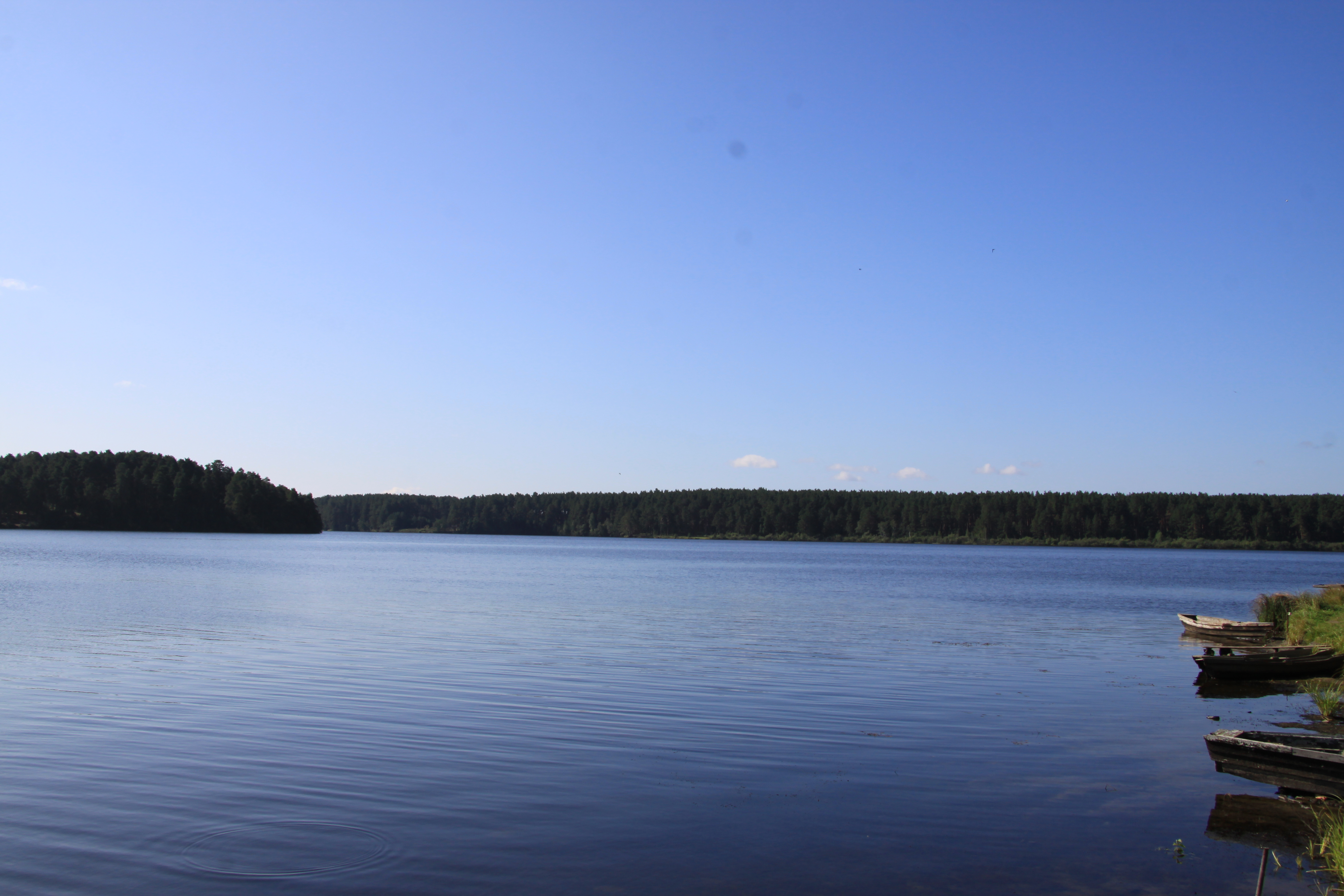 Сысертский пруд направо...